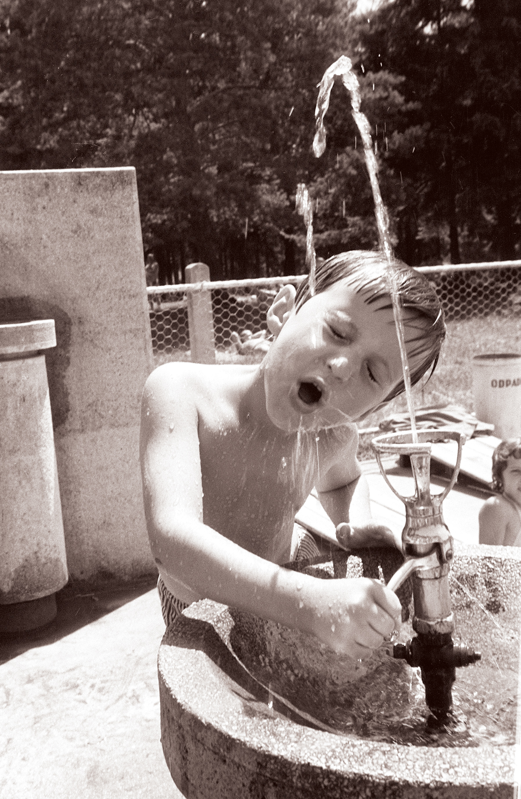 Deček ob vodometu